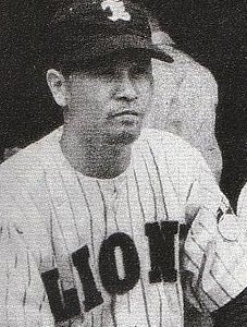 西鉄ライオンズ監督に就任した三原脩（1951年）